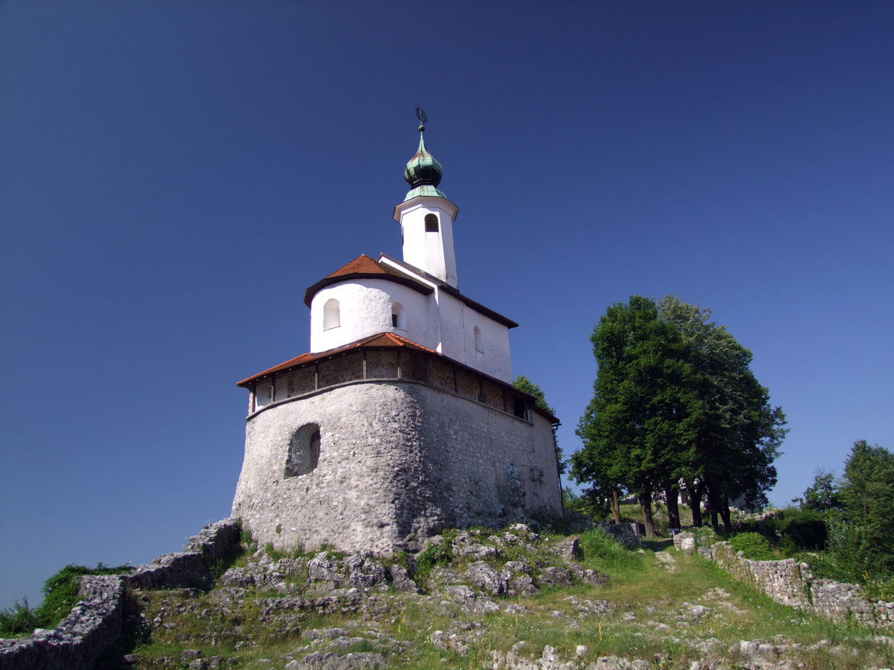 Mali Grad Church